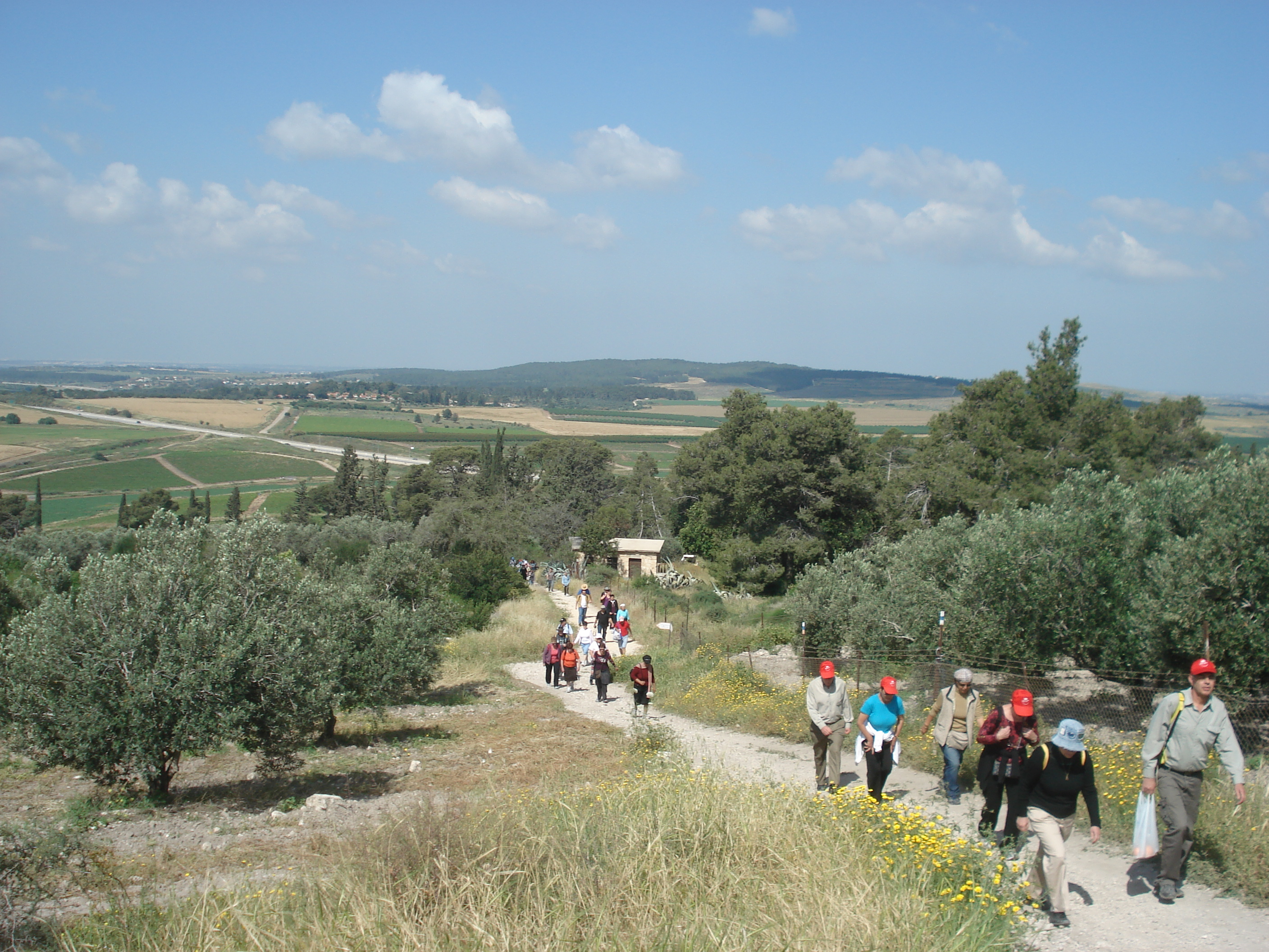 סיור העמותה ללטרון